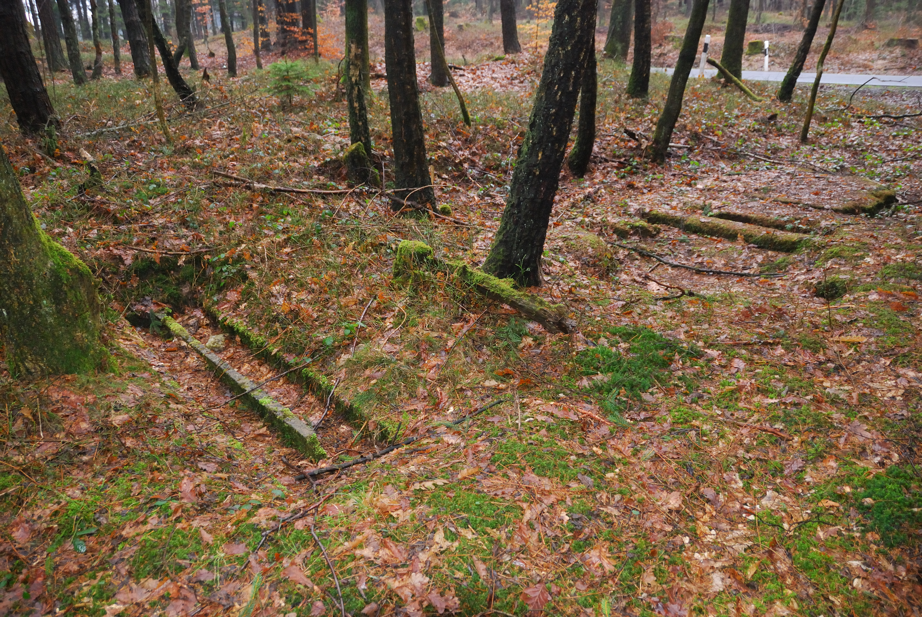 V1-Stellung bei Kuchhausen